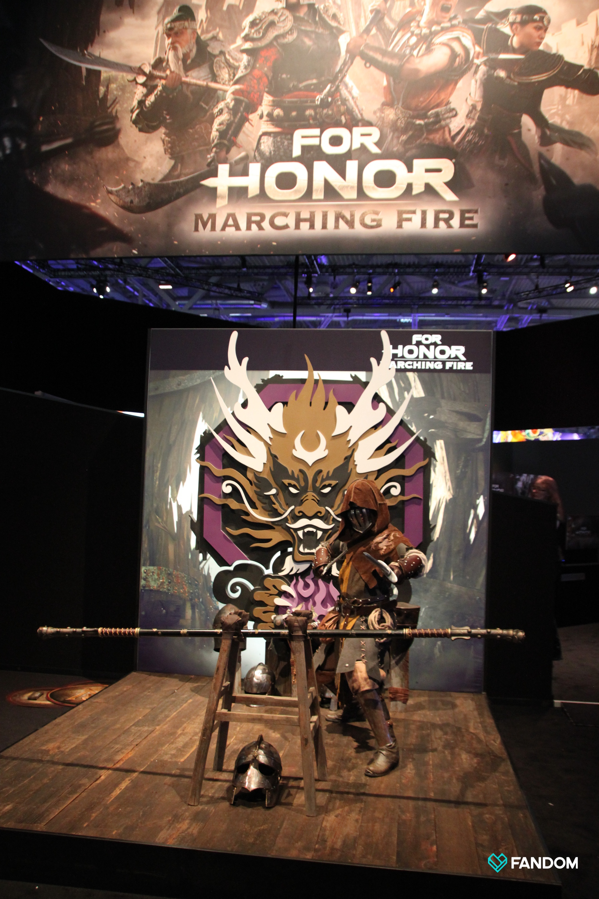 FANDOM für euch auf der gamescom unterwegs... Sonstige Neuigkeiten